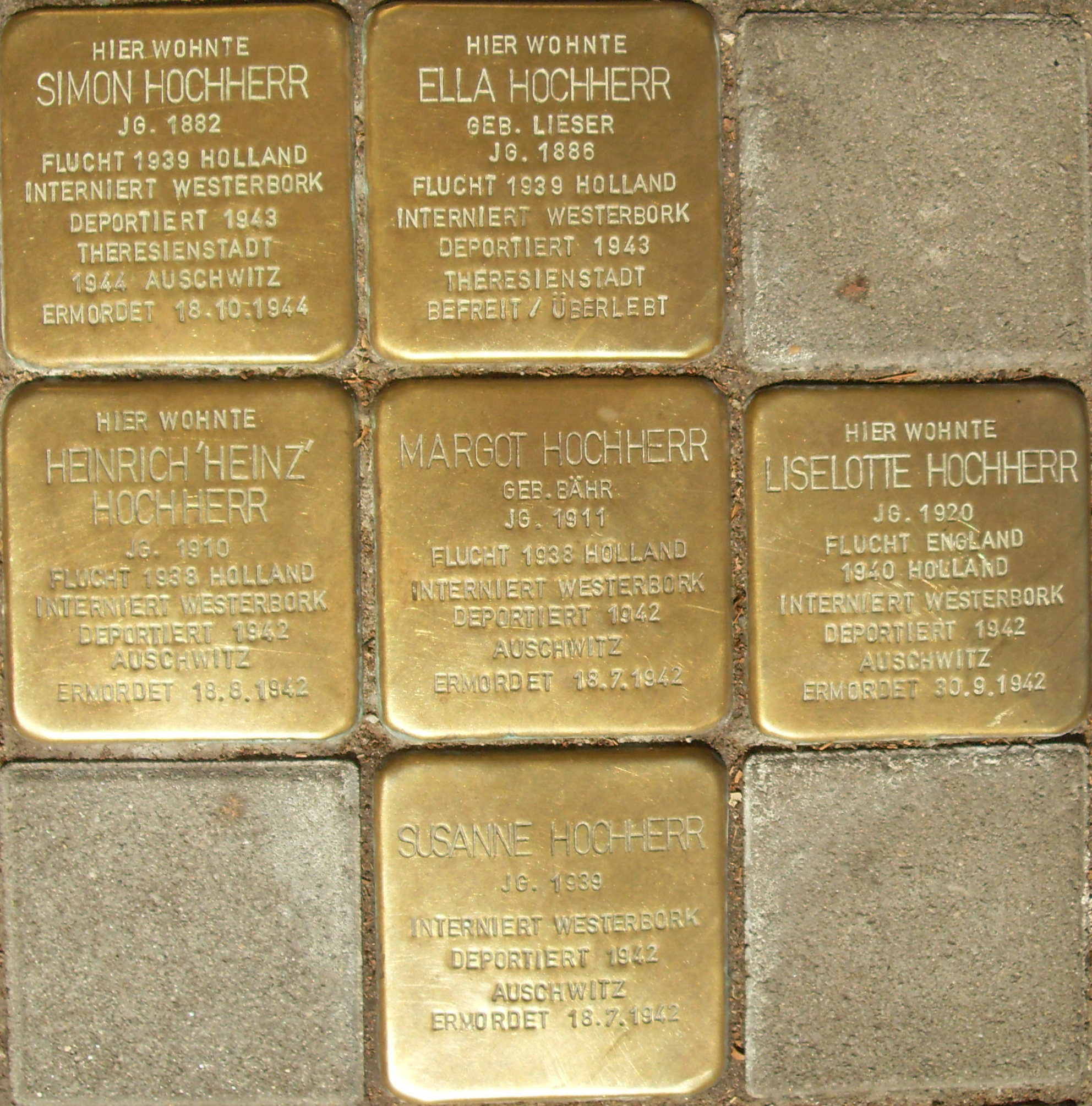 Stolpersteine Familie Hochherr in Heidelberg